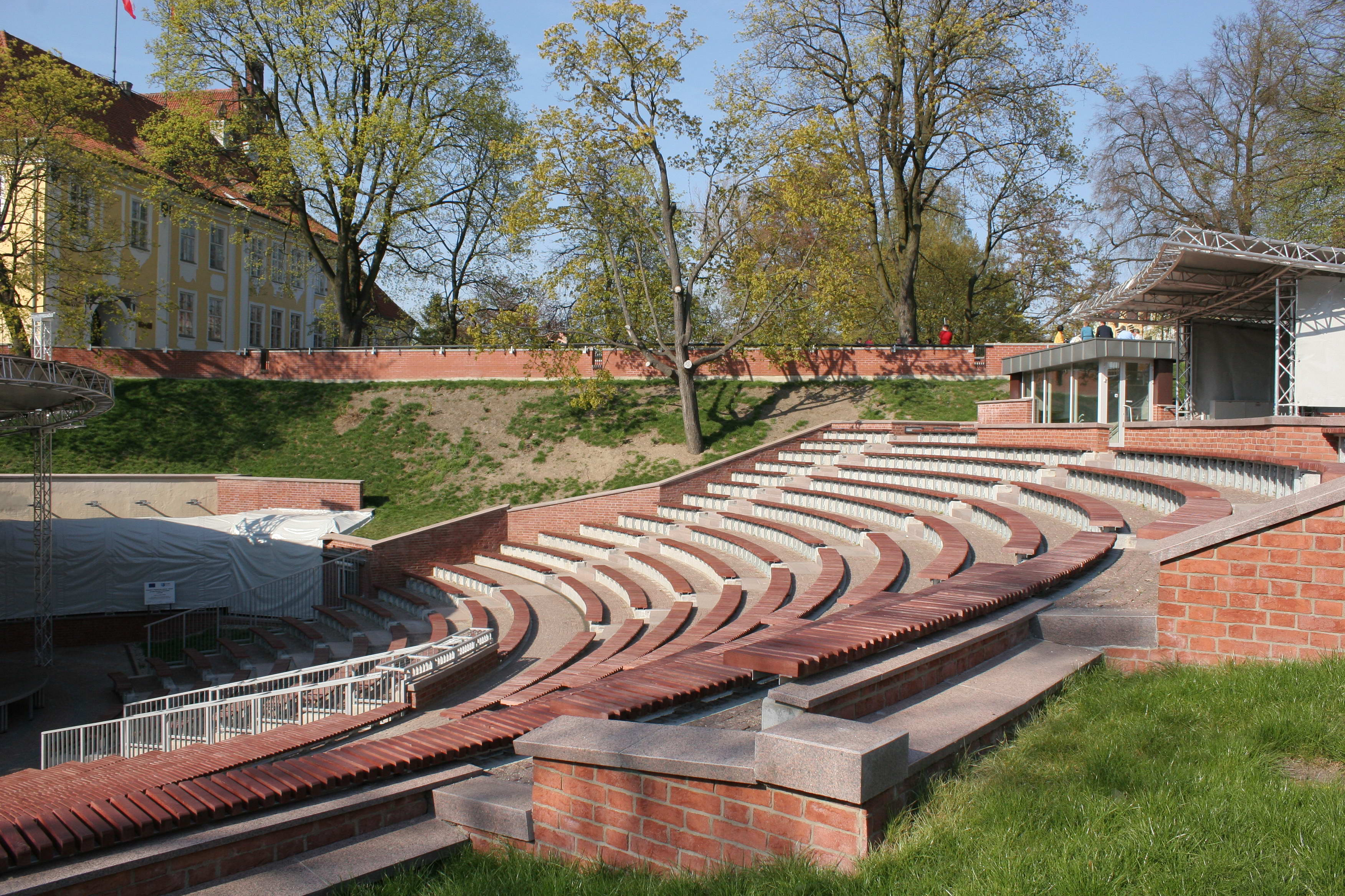 Fragment amfiteatru w Olsztynie